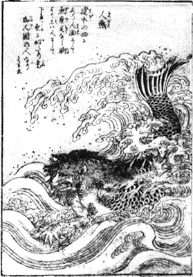 A ningyo, or Japanese mermaid, from Toriyama Sekien's Konjaku Hyakki Shūi